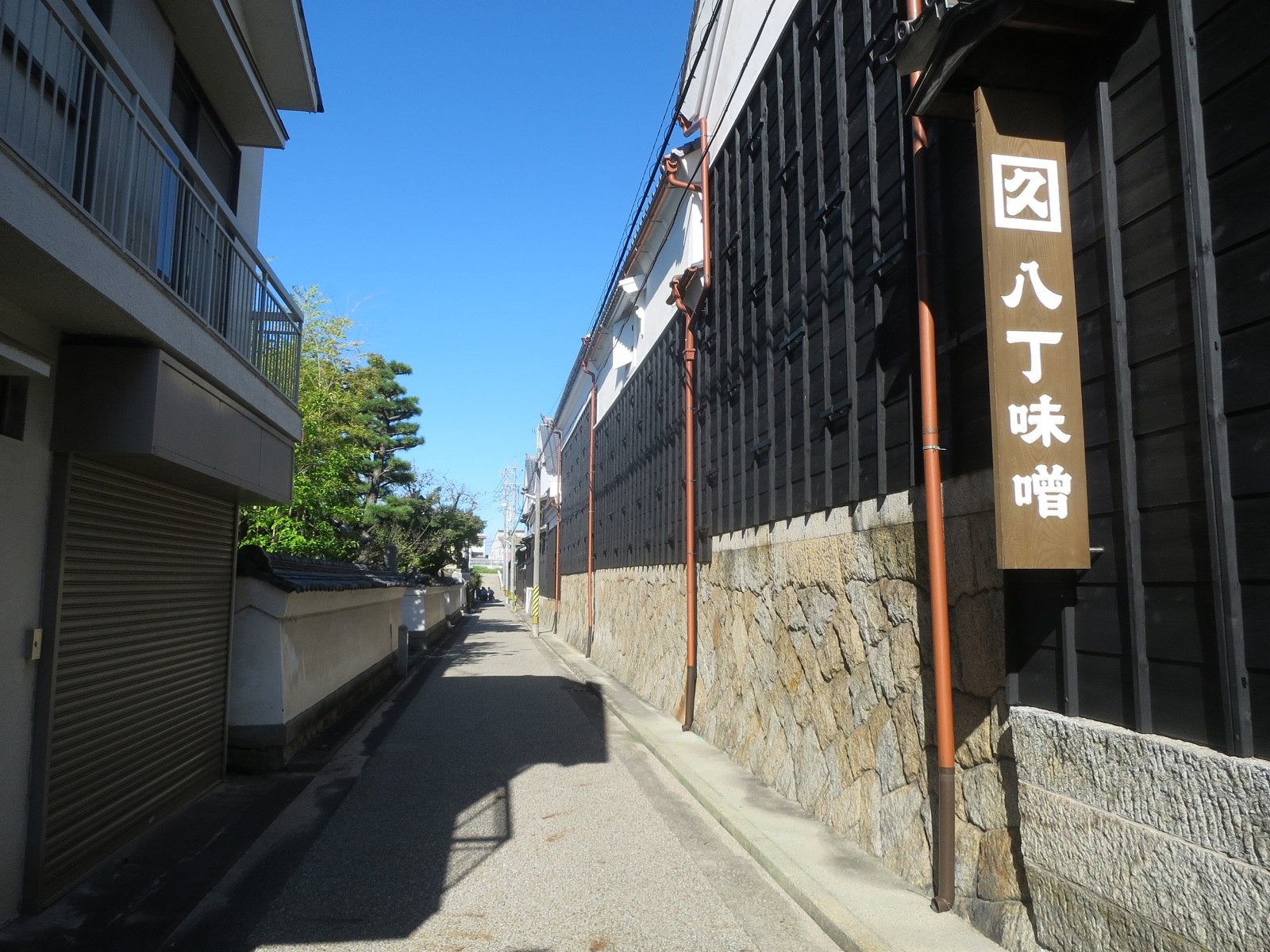 合資会社八丁味噌の本蔵（1879年建築）